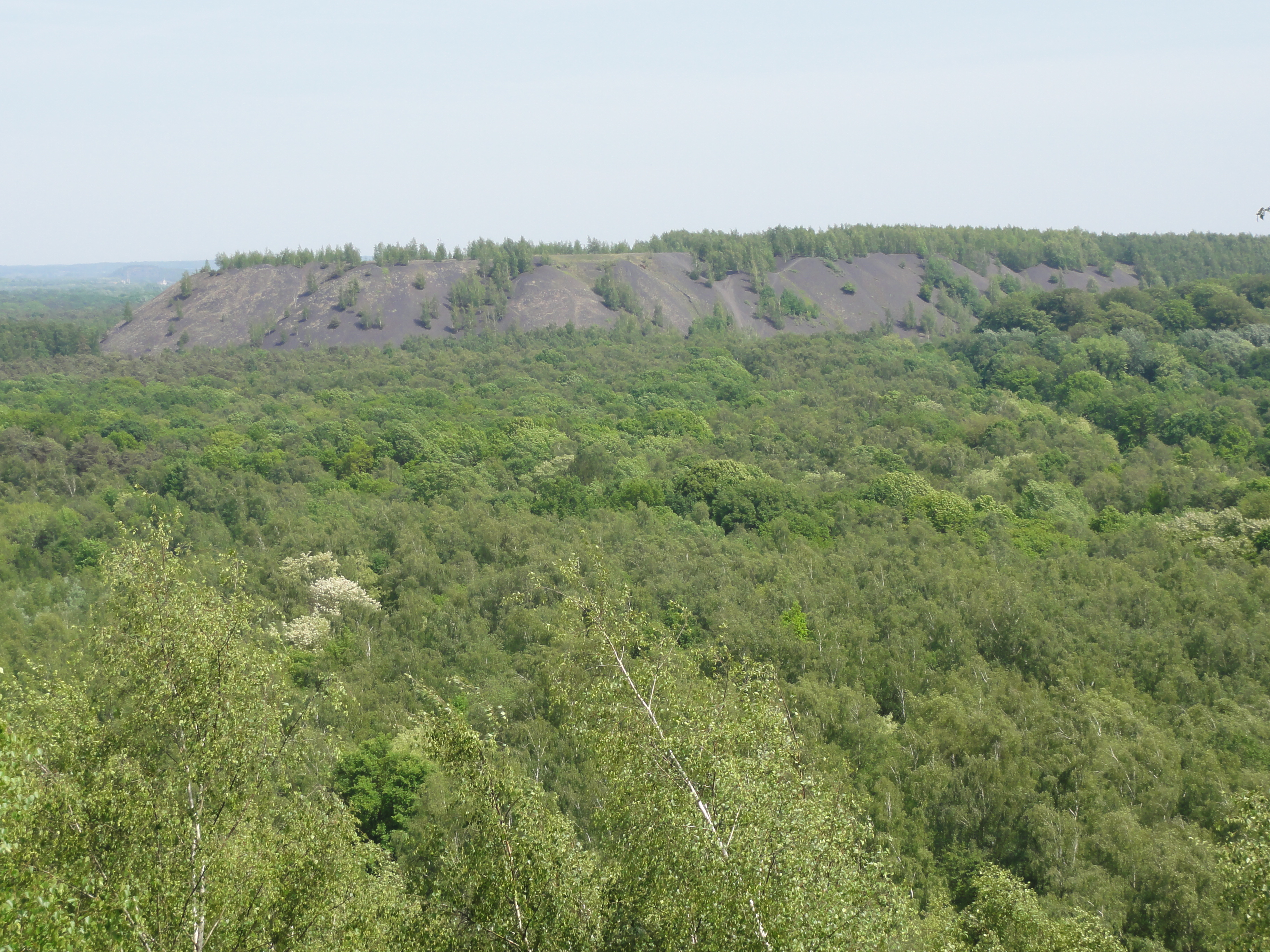 Terril n° 176 dit Lavoir Rousseau, Compagnie des mines d'Anzin, Raismes, Nord, Nord-Pas-de-Calais, France.